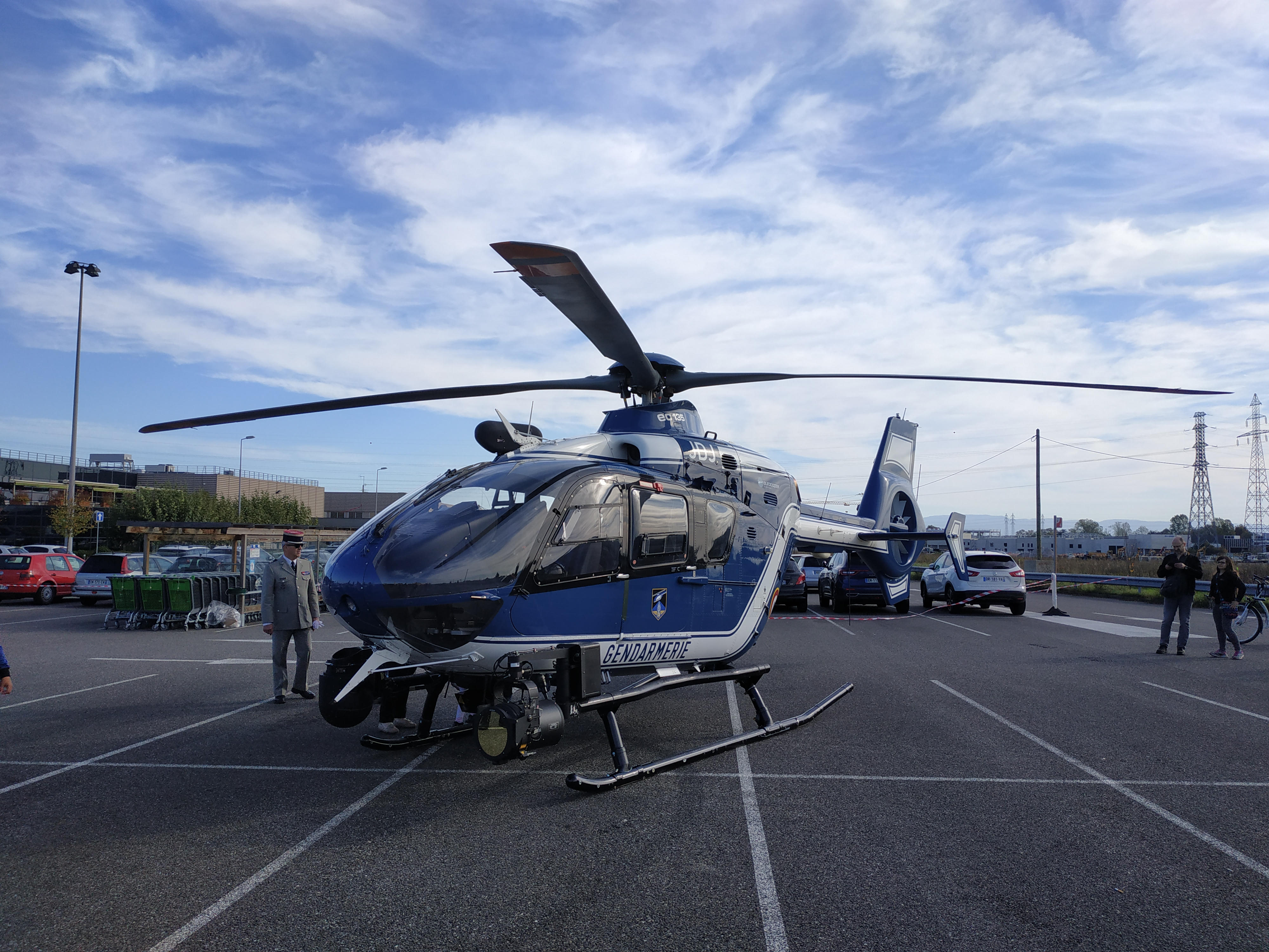 EC135 (ou H135) de la Gendarmerie nationale, immatriculé F-MJDJ, servant depuis Colmar. Photo prise à Mundolsheim dans le cadre des rencontres de la sécurité intérieure de 2019